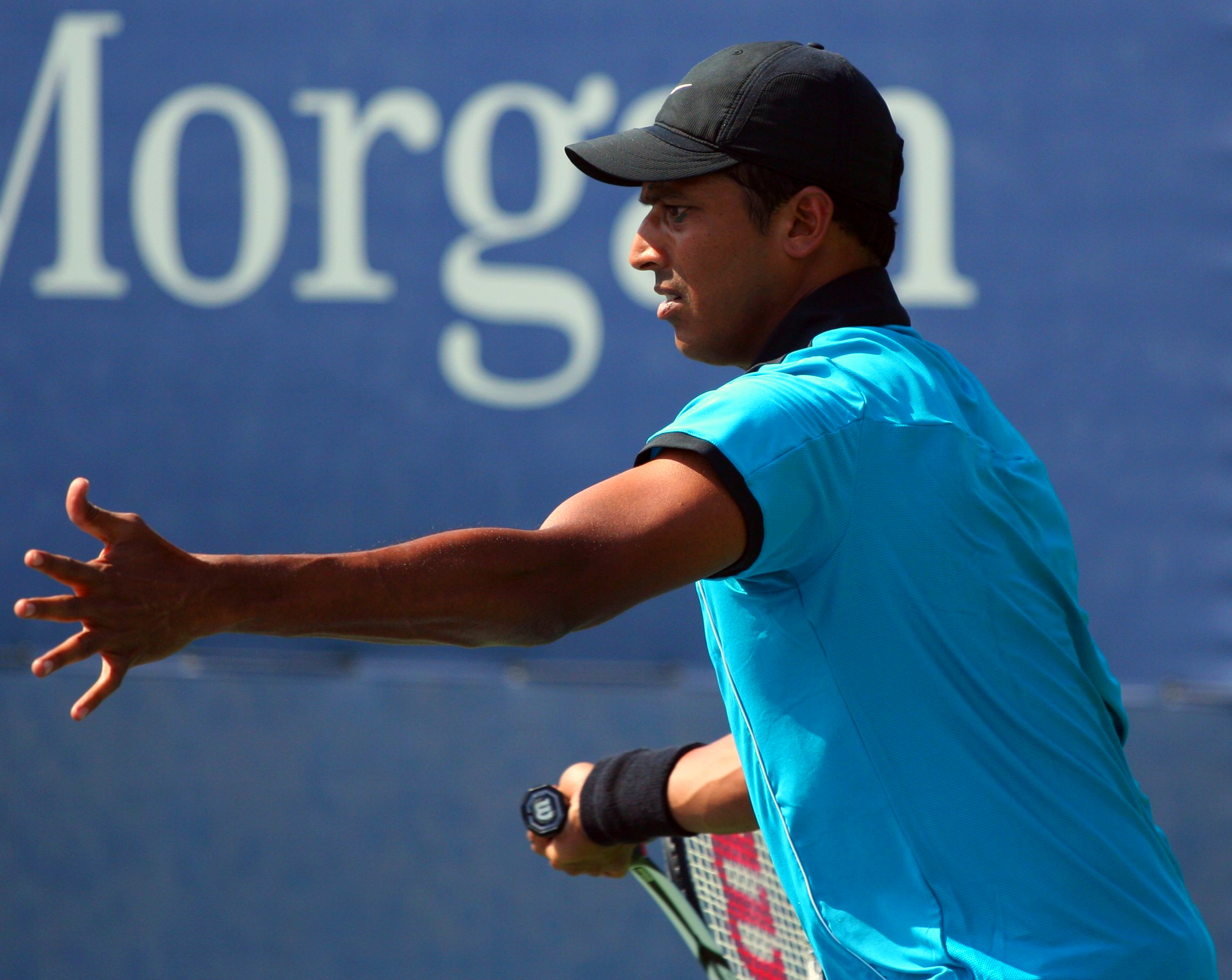 U.S. Open Saturday, Sept. 5, 2009